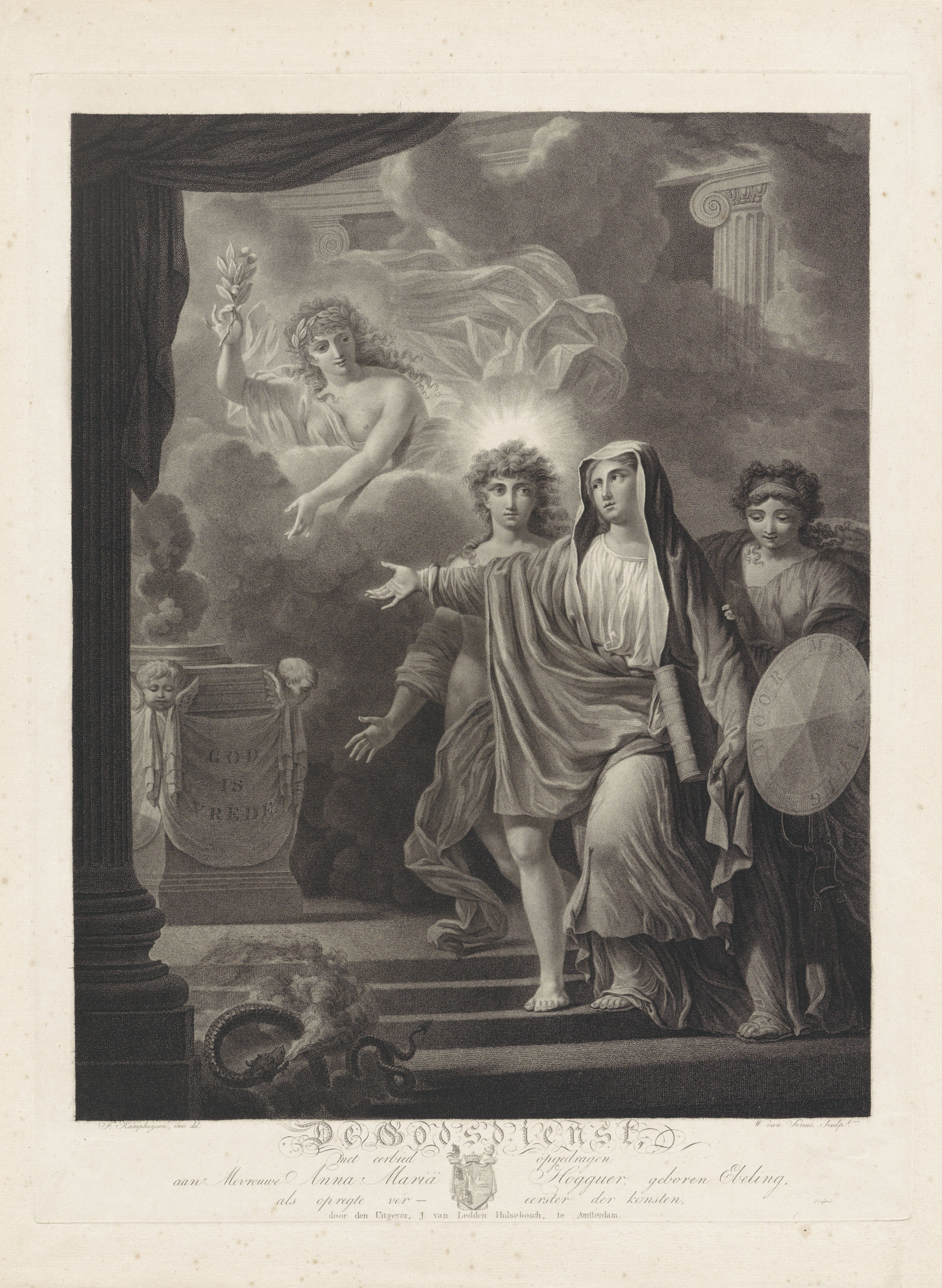 IdentificatieTitel(s): Allegorische voorstelling van de GodsdienstDe Godsdienst (titel op object)Objecttype: prent Objectnummer: RP-P-OB-70.110Catalogusreferentie: Collectie Rijksmuseum-3(3)Opmerking: Drie staten in collectie Rijksmuseum Amsterdam.Opschriften / Merken: verzamelaarsmerk, verso midden onder, gestempeld: Lugt 2228Omschrijving: Godsdienst staat bij een altaar, Waar: aan een doek hangt met het opschrift "God is vrede". Zij wordt geflankeerd door twee allegorische figuren, mogelijk Wijsheid en Waarheid. Boven hen kijkt vanuit de wolken Vrede toe. Linksonder spuwt een slang zijn verderfelijke adem. Onder de prent de titel en een wapenschild, aan weerszijden waarvan een opdracht aan Anna Maria Hogguer- Ebeling, een Amsterdamse kunstverzamelaar.VervaardigingVervaardiger: prentmaker: Willem van Senus (vermeld op object)naar tekening van: Jan Kamphuijsen (vermeld op object)uitgever: J. van Ledden Hulsebosch (vermeld op object)opgedragen aan: Anna Maria Ebeling (vermeld op object)opgedragen door: J. van Ledden Hulsebosch (vermeld op object)Plaats vervaardiging: AmsterdamDatering: 1802 - 1812Fysieke kenmerken: gravure; proefdrukMateriaal: papier Techniek: graveren (drukprocedé)Afmetingen: plaatrand: h 563 mm × b 428 mmOnderwerpWat: symbols, allegories of peace, 'Pax'; 'Pace' (Ripa)Wisdom; 'Sapienza', 'Sapienza humana', 'Sapienza vera' (Ripa)Truth; 'VeritÃ ' (Ripa)Faith, 'Fides'; 'Fede', 'Fede catholica', 'Fede christiana', 'Fede christiana catholica' (Ripa) ~ one of the Three Theological VirtuesWie: Anna Maria EbelingVerwerving en rechtenVerwerving: onbekendCopyright: Publiek domein